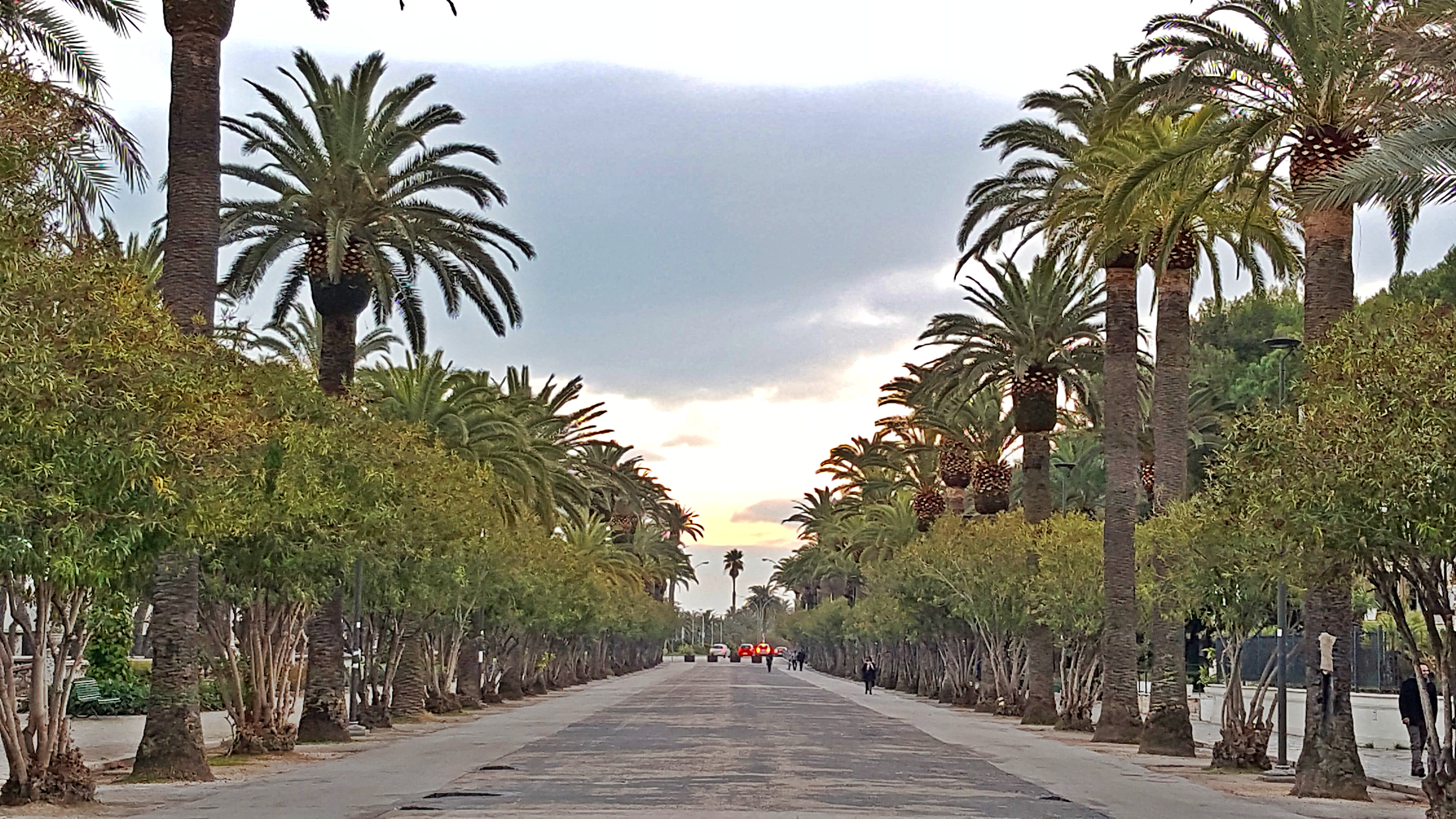 San Benedetto del Tronto, scorcio di Viale Bruno Buozzi Object location42° 57′ 05.71″ N, 13° 53′ 05.44″ E